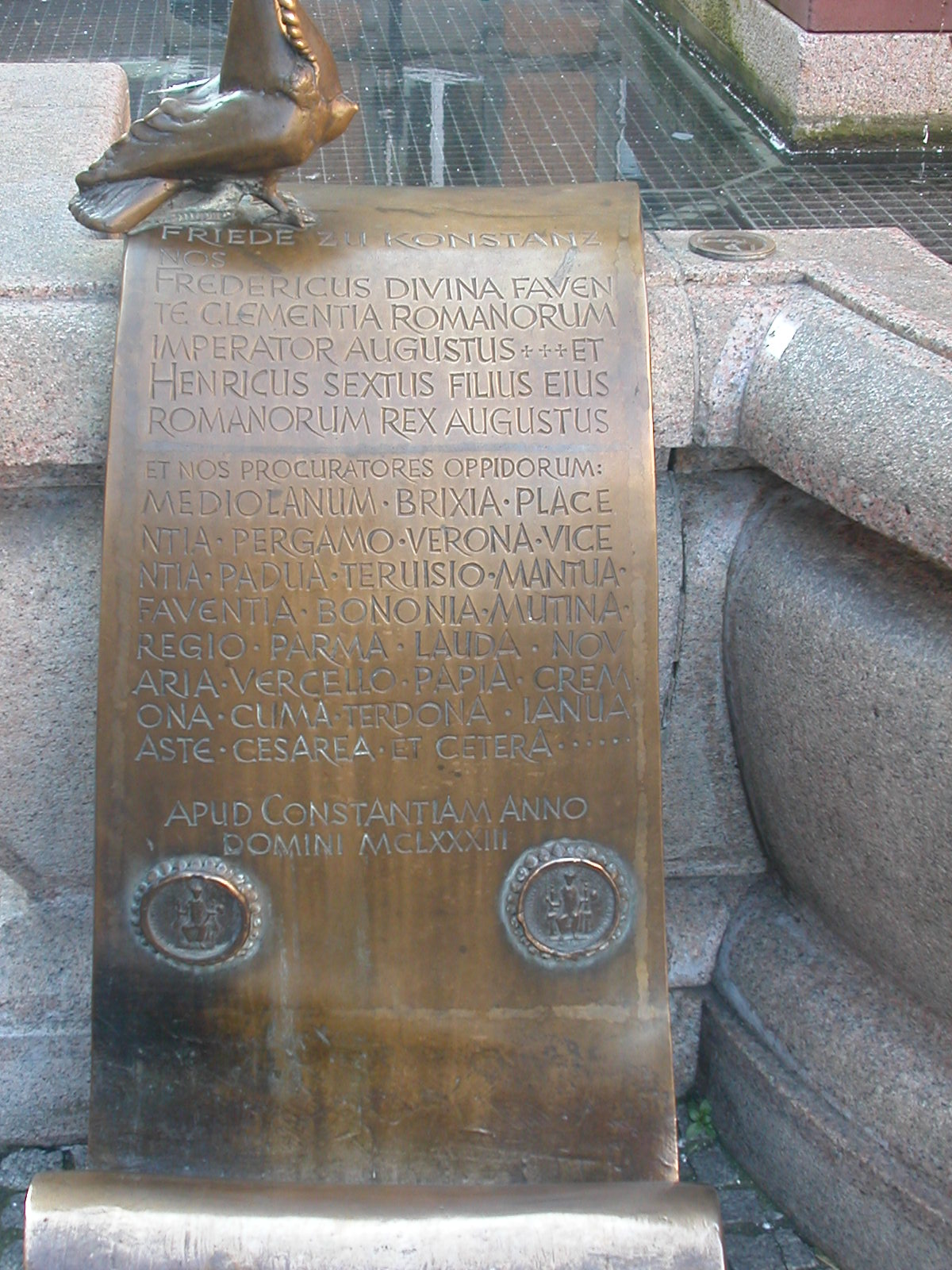 Kaiserbrunnen in Konstanz - Urkunde vom Friede von Konstanz